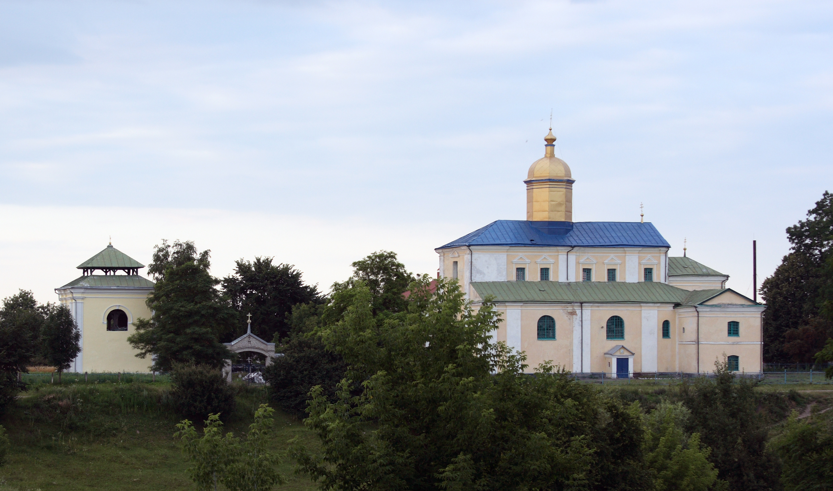 Церковь в селе Жидичин, Волынская область, Украина